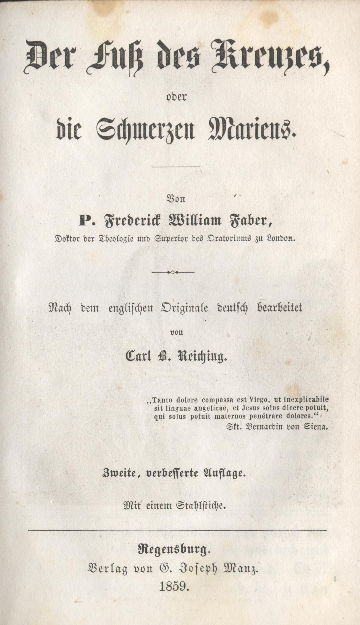 Frederick Faber, Buchtitel, 1859